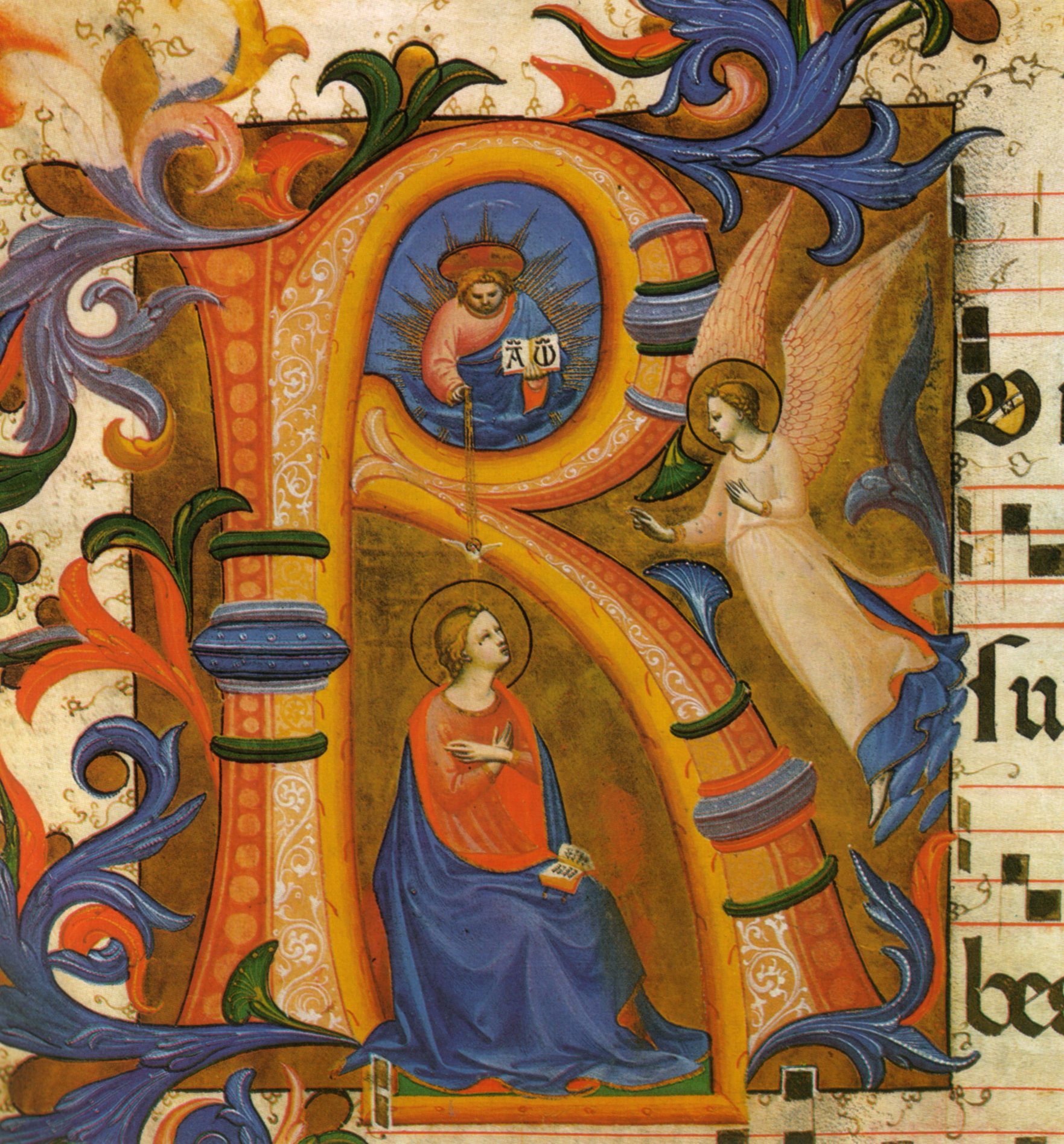 Beato angelico, anunciazione c. 33v, messale 558, 1430 circa, san marco, firenze